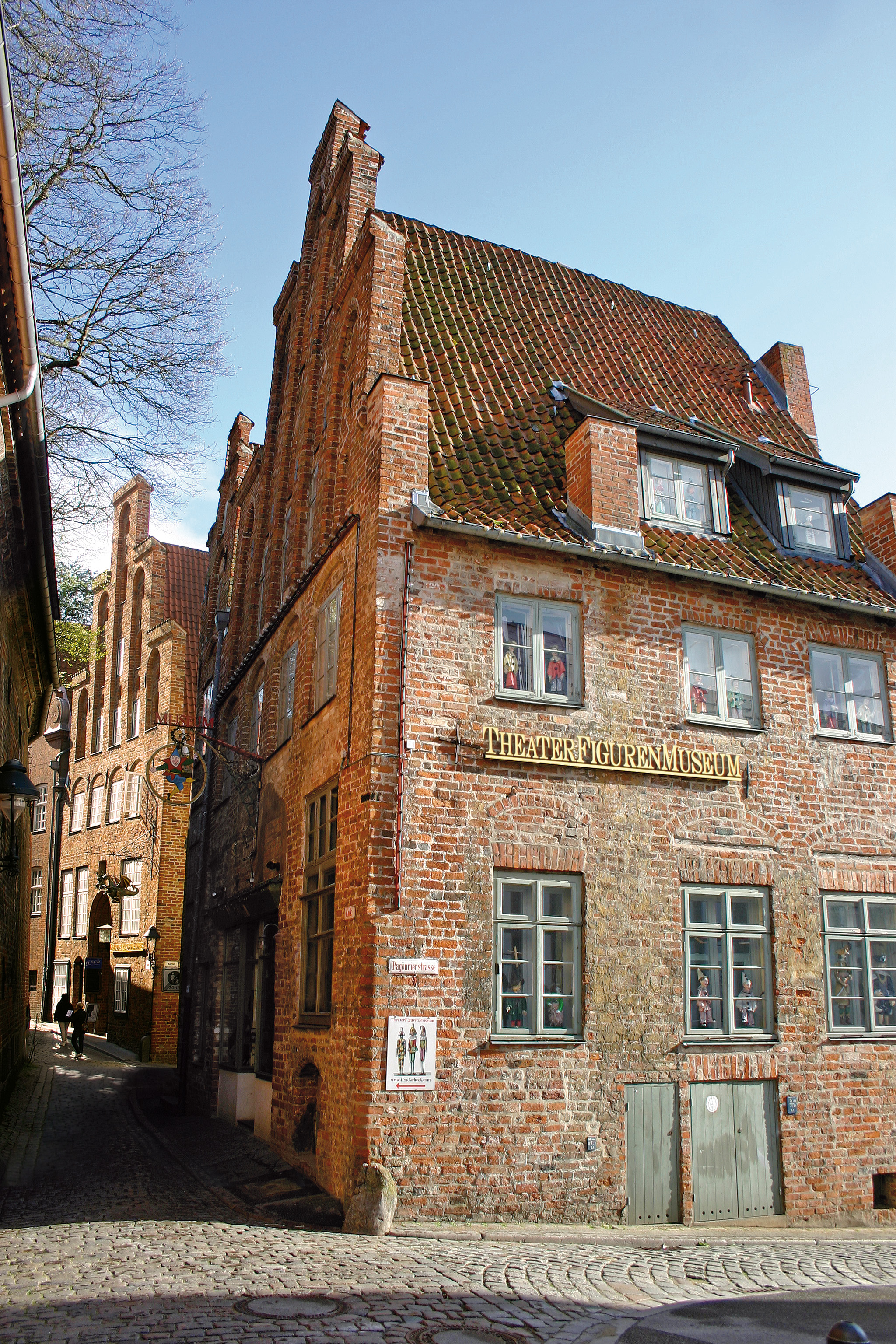 Theaterfigurenmuseum Lübeck